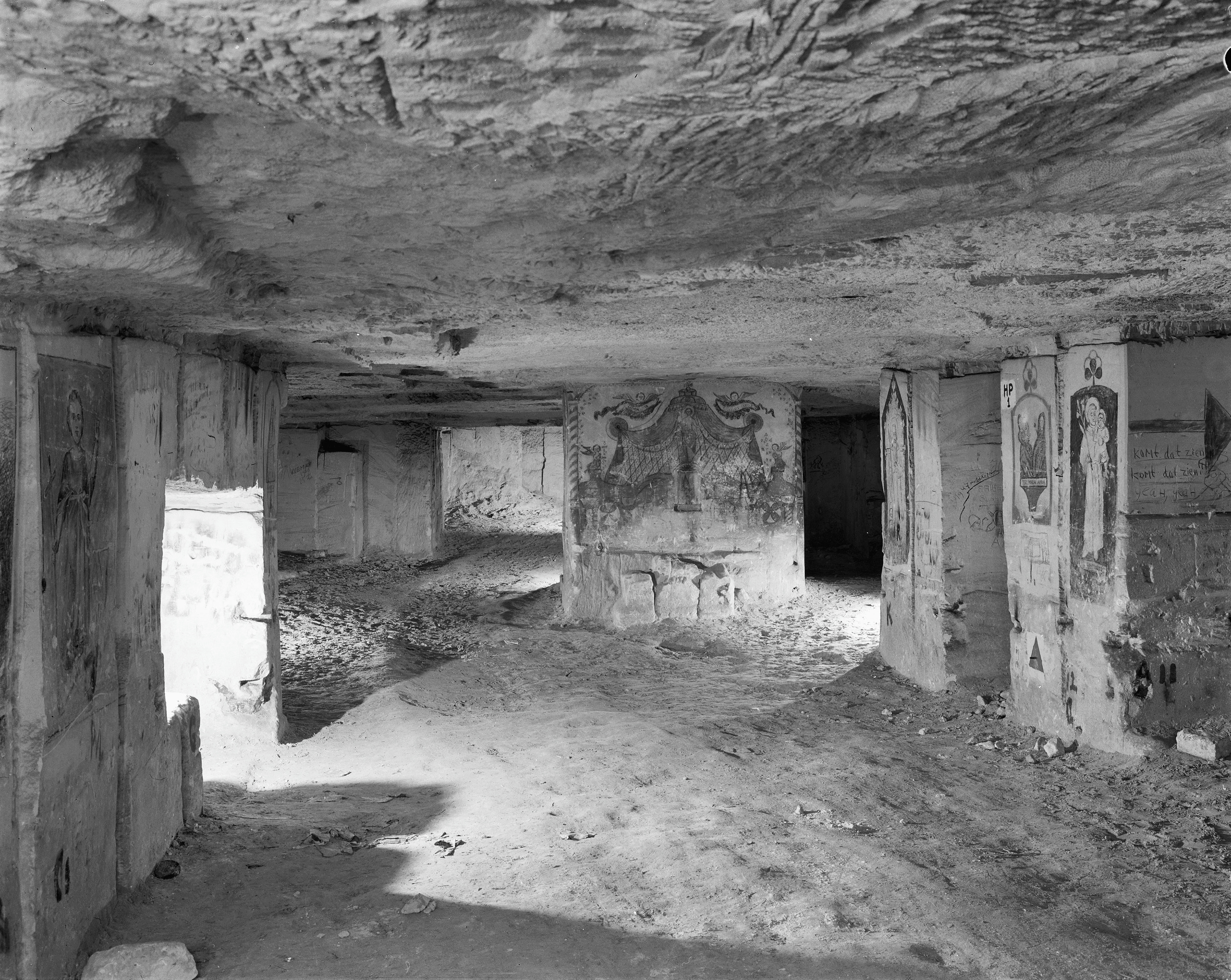 Groeve, Kapel (opmerking: Gebruikt voor Monumenten In Nederland Limburg, bladzijde 57)